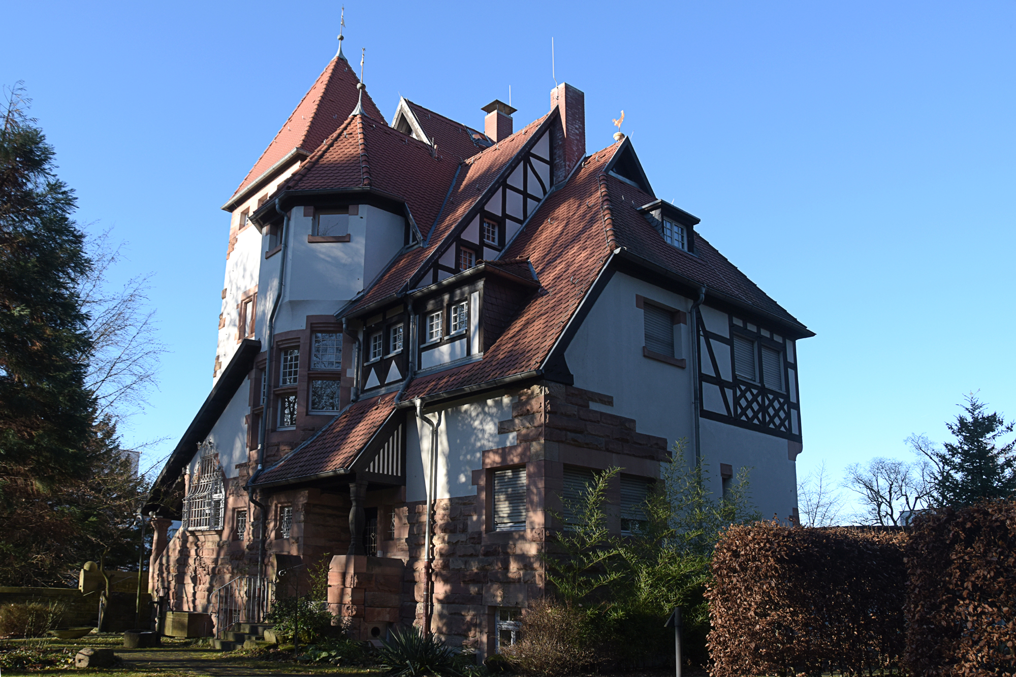 Denkmalgeschützte Gründerzeitvilla auf dem Gelände des Marienhospitals, Darmstadt, Martinspfad 72